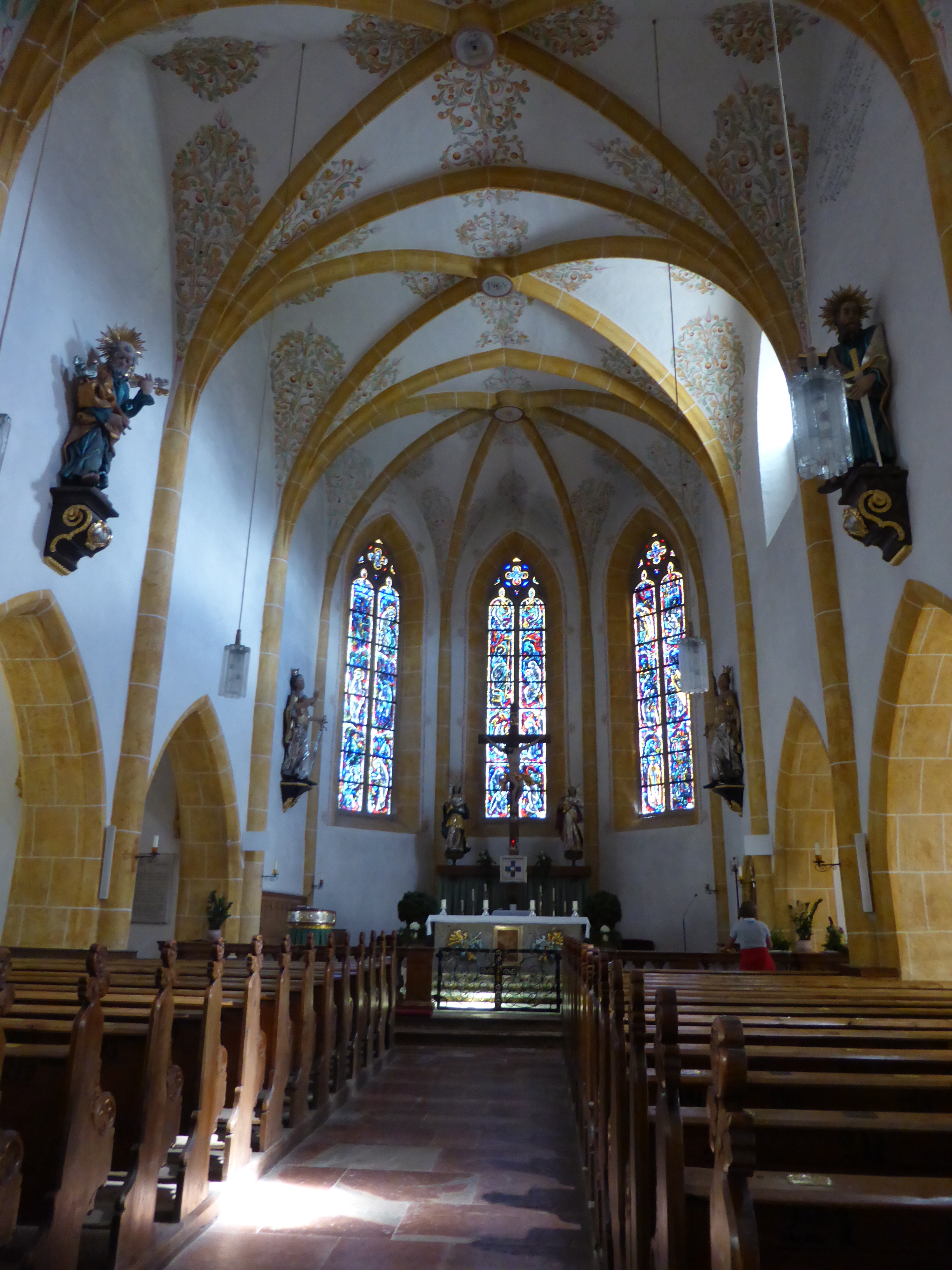 Kath. Pfarrkirche Dekanatskirche Unsere liebe Frau Geburt